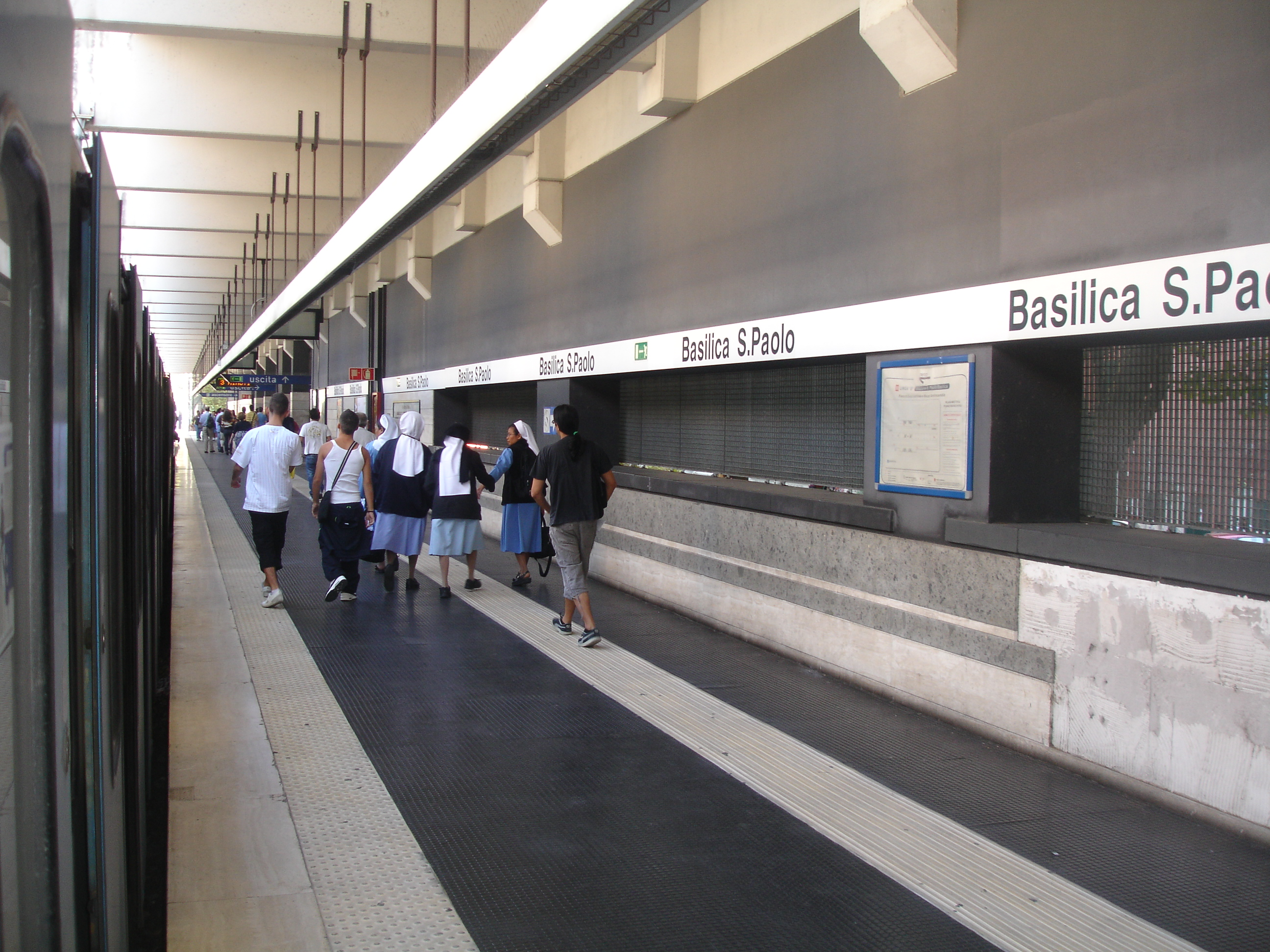 Uno scorcio della stazione Basilica San Paolo.